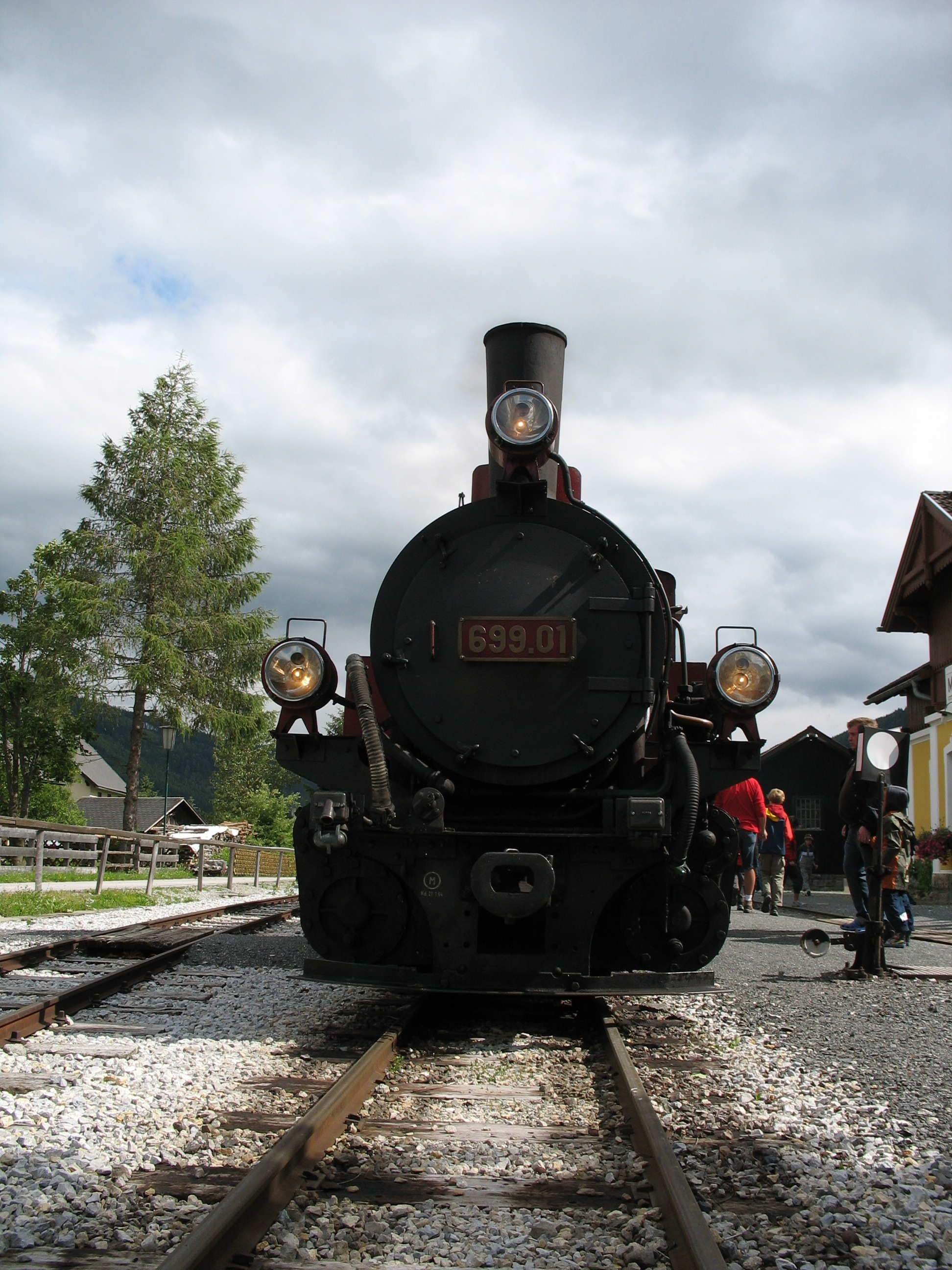 Die Dampflokomotive des Club 760 in Bahnhof Mauterndorf.